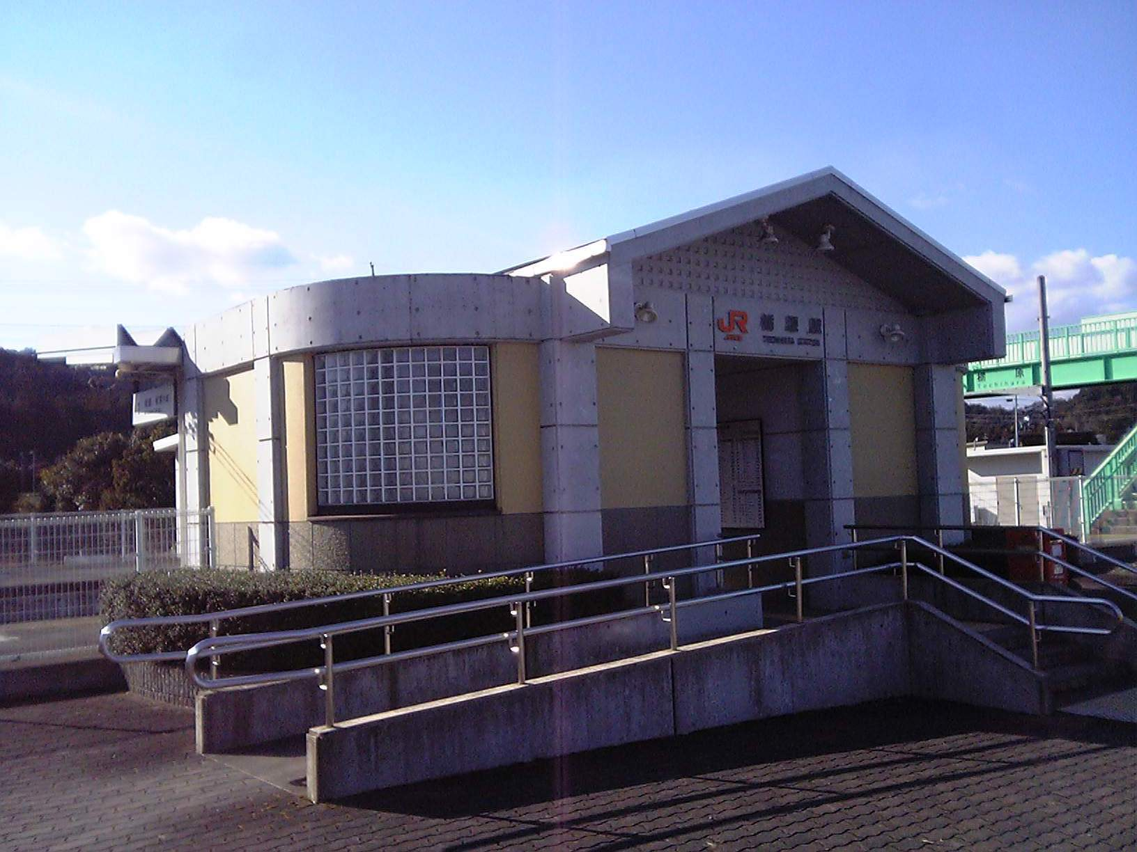 栃原駅駅舎